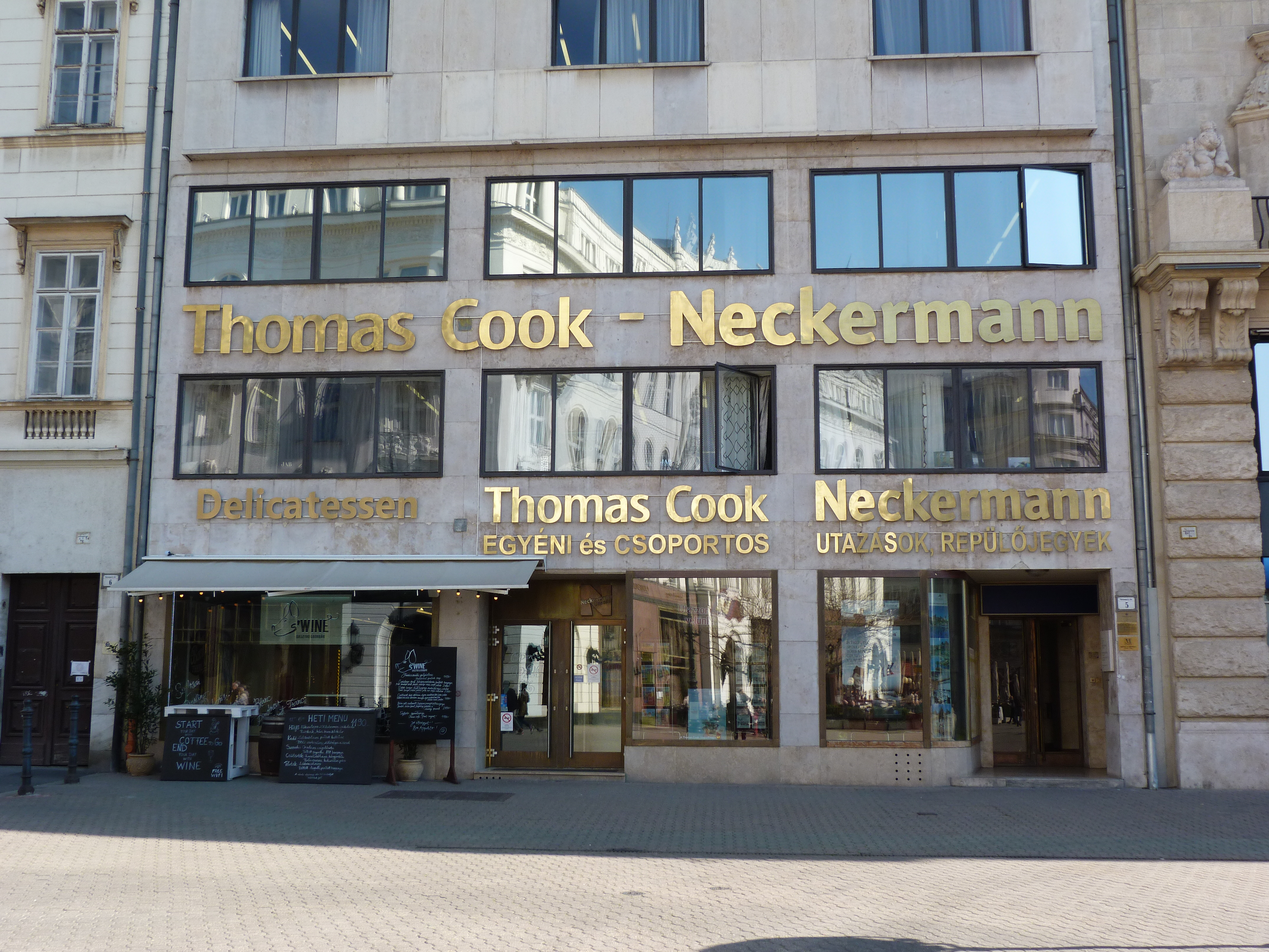 A felvétel 2015. március 19-én csütörtökön készült Budapesten, az Andrássy úton. ©© Derzsi Elekes Andor, Budapest, 2015, A fénykép másolását és felhasználását a szerző ellenérték nélkül, jogutódjaira is kihatóan megengedi. Az engedély kiterjed a kereskedelmi célú hasznosításra is. Kéri azonban nevének feltüntetését a felhasználás során. A Metapolisz sorozat valamennyi képe és filmje Creative Commons alatti. kereskedelmi - for profit - célra is felhasználható. Ajánlott hivatkozás: Derzsi Elekes Andor: Metapolisz DVD line